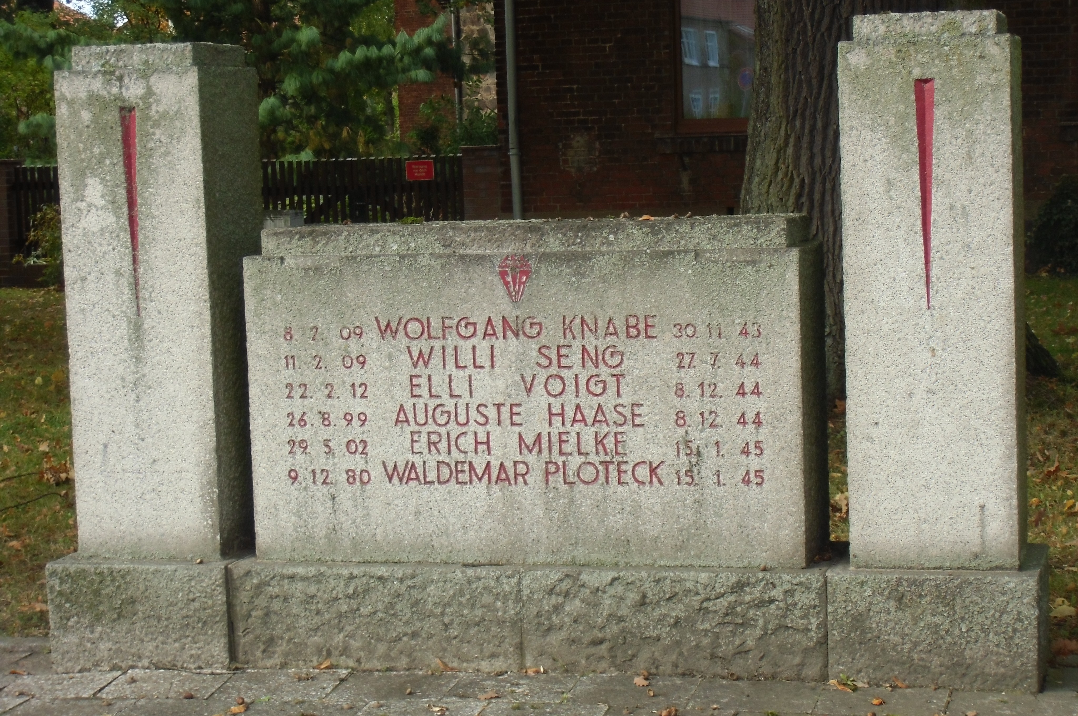 Ehrenmal für ermordete Antifaschisten aus Schönow auf dem Dorfanger, Nr. 72 in der Liste der Baudenkmale in Bernau bei Berlin